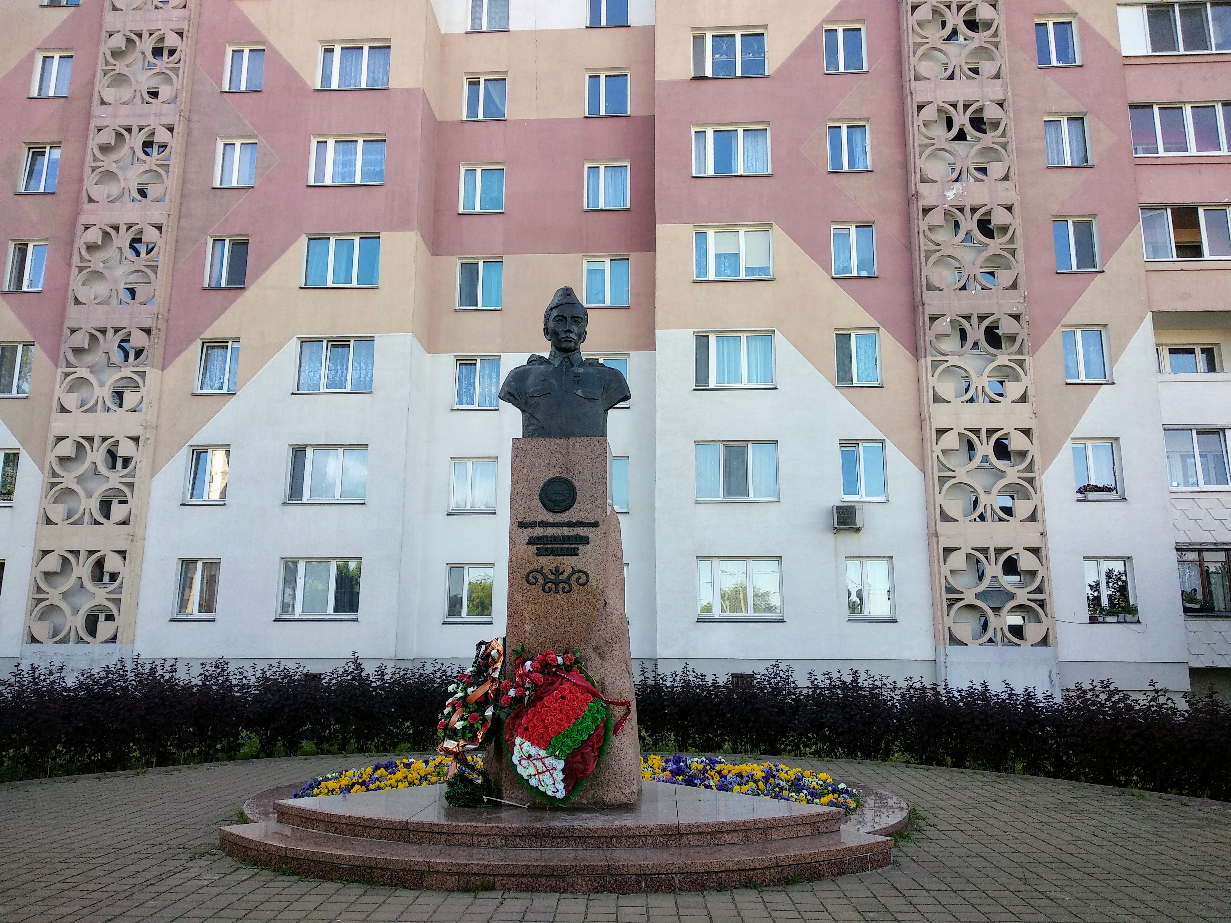 Monument to Asanaliev, Minsk, Belarus